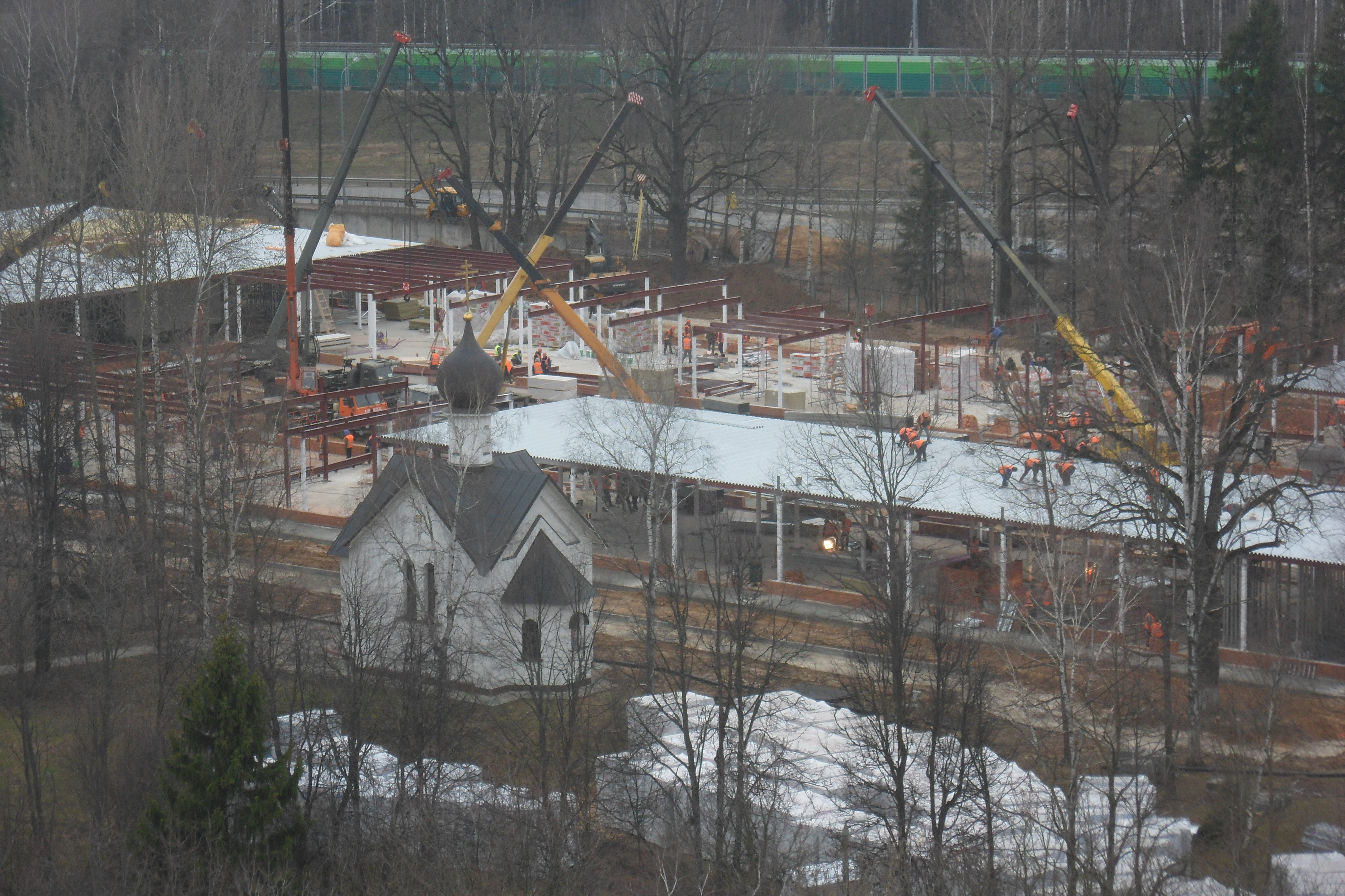 Строительство инфекционного отделения в Филиале №3 3 ЦВКГ им. Вишневского в г. Одинцово 30 марта 2020 года. Министерство Обороны осуществляет строительство инфекционных отделений в связи с пандемией коронавируса.